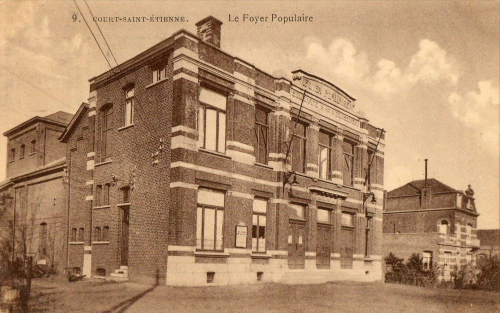 Le Foyer Polulaire de Court-Saint-Etienne tel qu'à l'époque de son inauguration (1913) (avec son fronton sculpté qui porte les inscriptions suivantes : "Foyer Populaire" et "Solidarité - Délassement"). Carte postale ancienne.